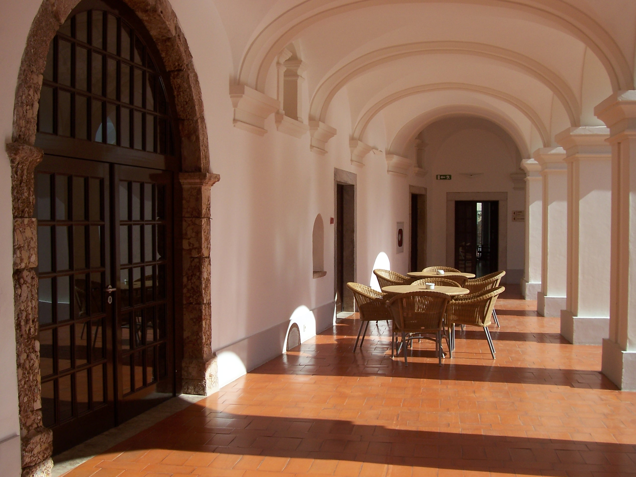 Pousada de Alcacer